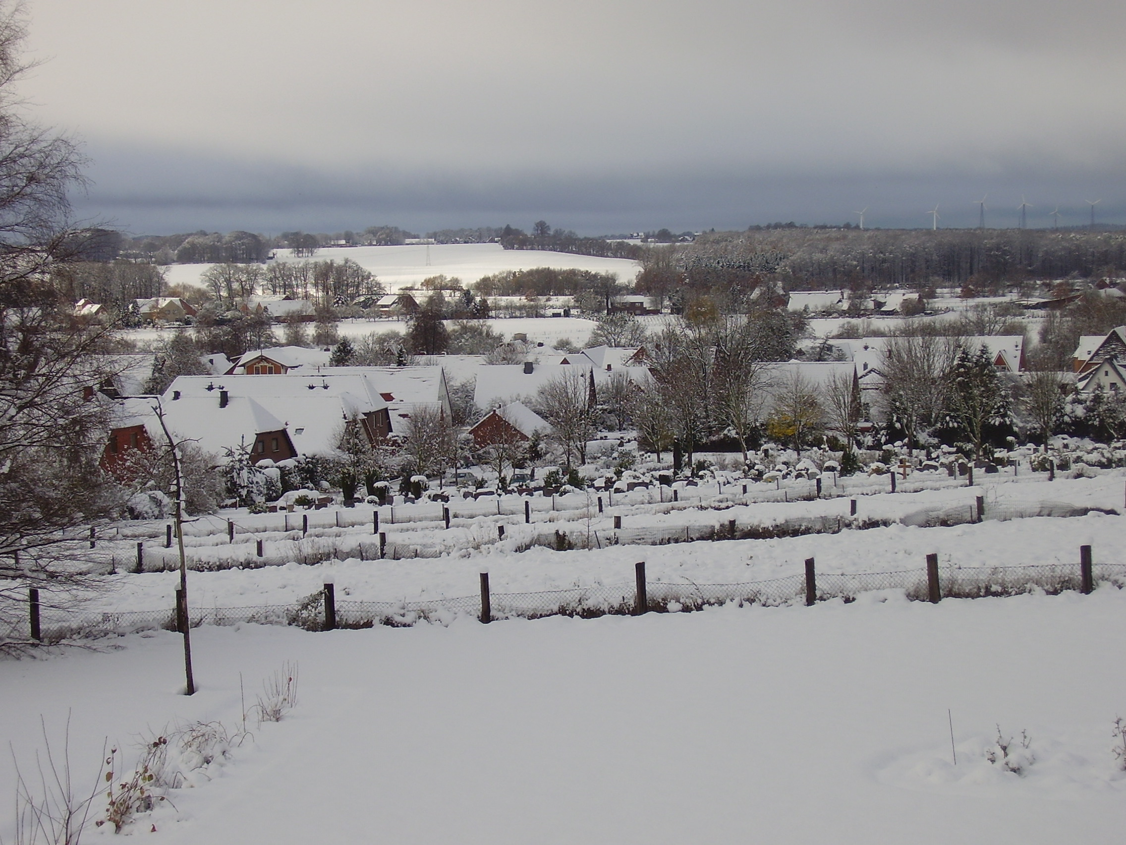 Syke; ortsteil Barrien, Niedersachsen; fotografiert: November 2008